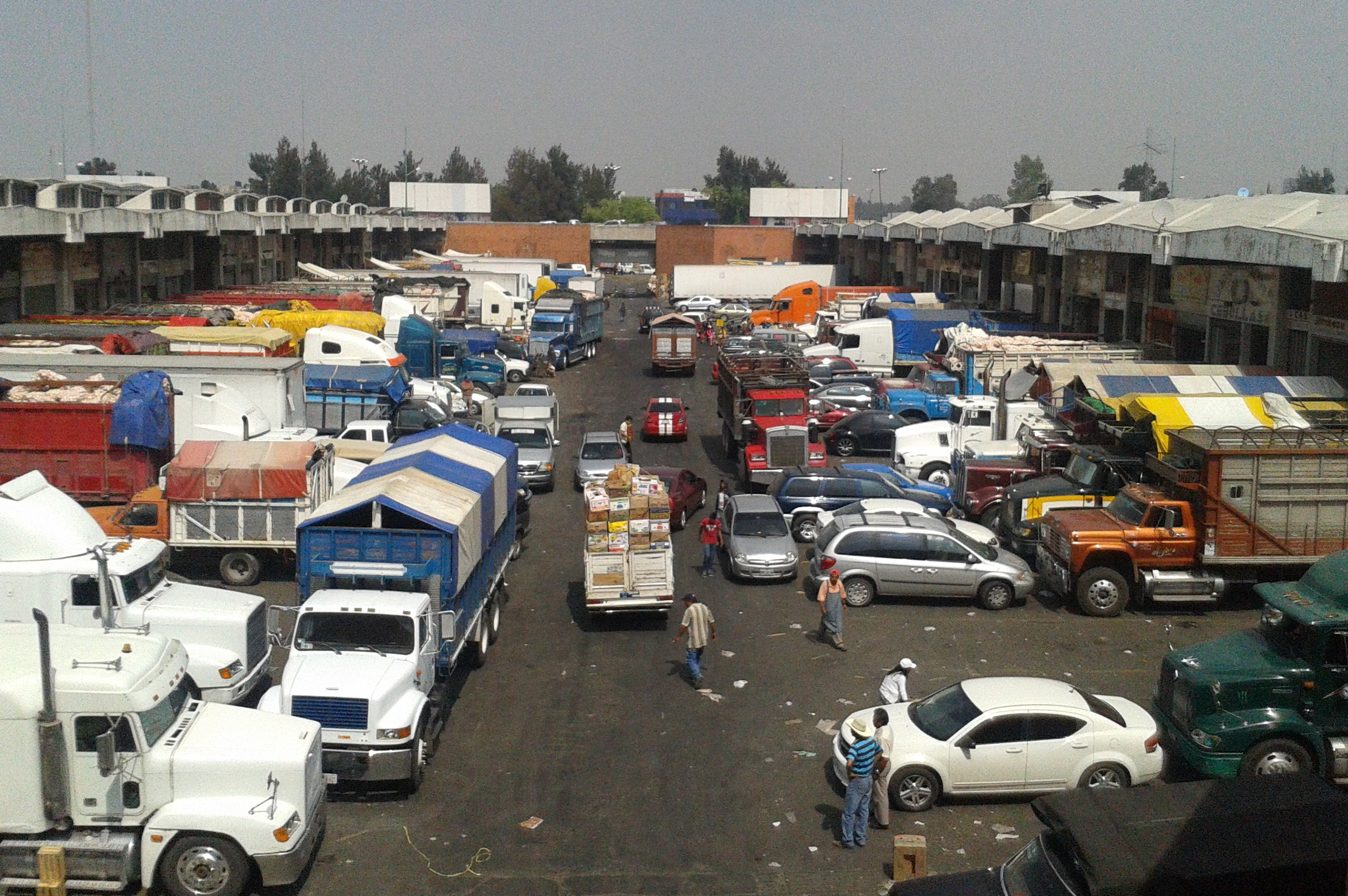 Vista de la zona de andenes N-O de la Central de Abasto de la ciudad de México, en la zona de Frutas y Legumbres, desde la zona de estacionamientos altos.